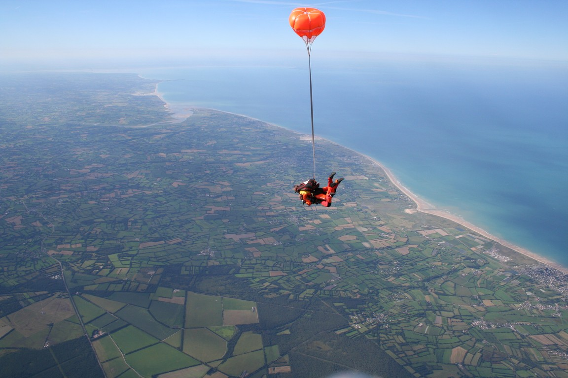 Saut en parachute proche de la Baie du Mont saint-Michel avec l'école de parachutisme de Lessay en Normandy